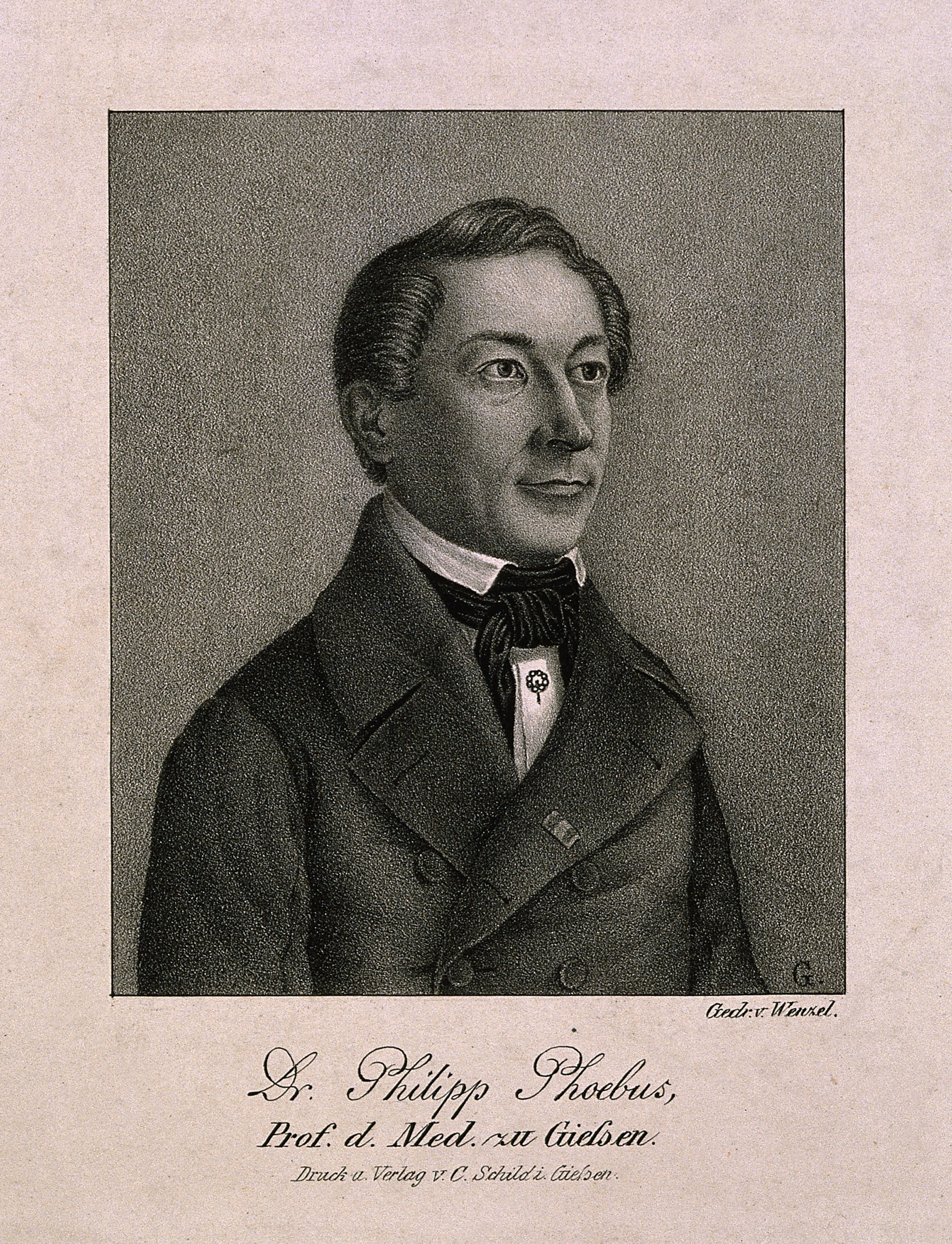 Genre/Technique: Portrait prints. Lithographs. Subject name: Phoebus, Philipp, 1804-1880.